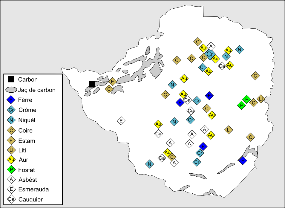 Ressorsas naturalas de Zimbabwe.